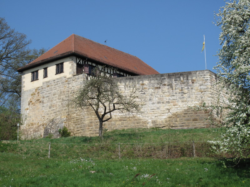 Wäscherschloss